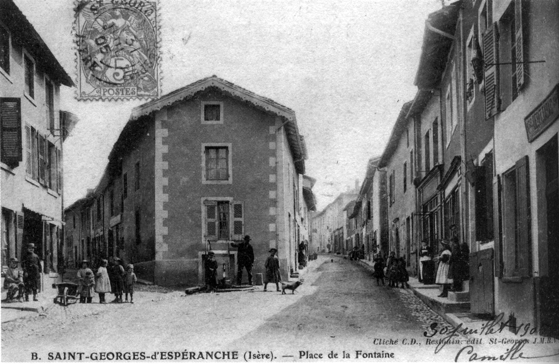 Saint-Georges-d'Espéranche, place de la fontaine, 1905